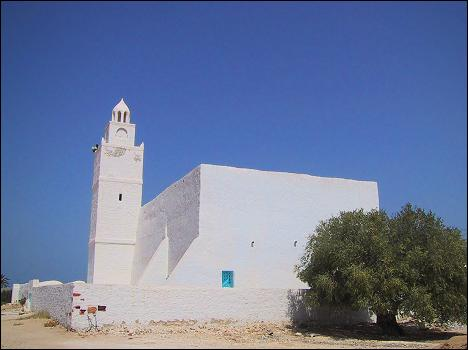 Mosquée de Medrajen à Mezraya avec une architecture spécifique de l'île, Cliché de Bilel Hawari, Mai 1995